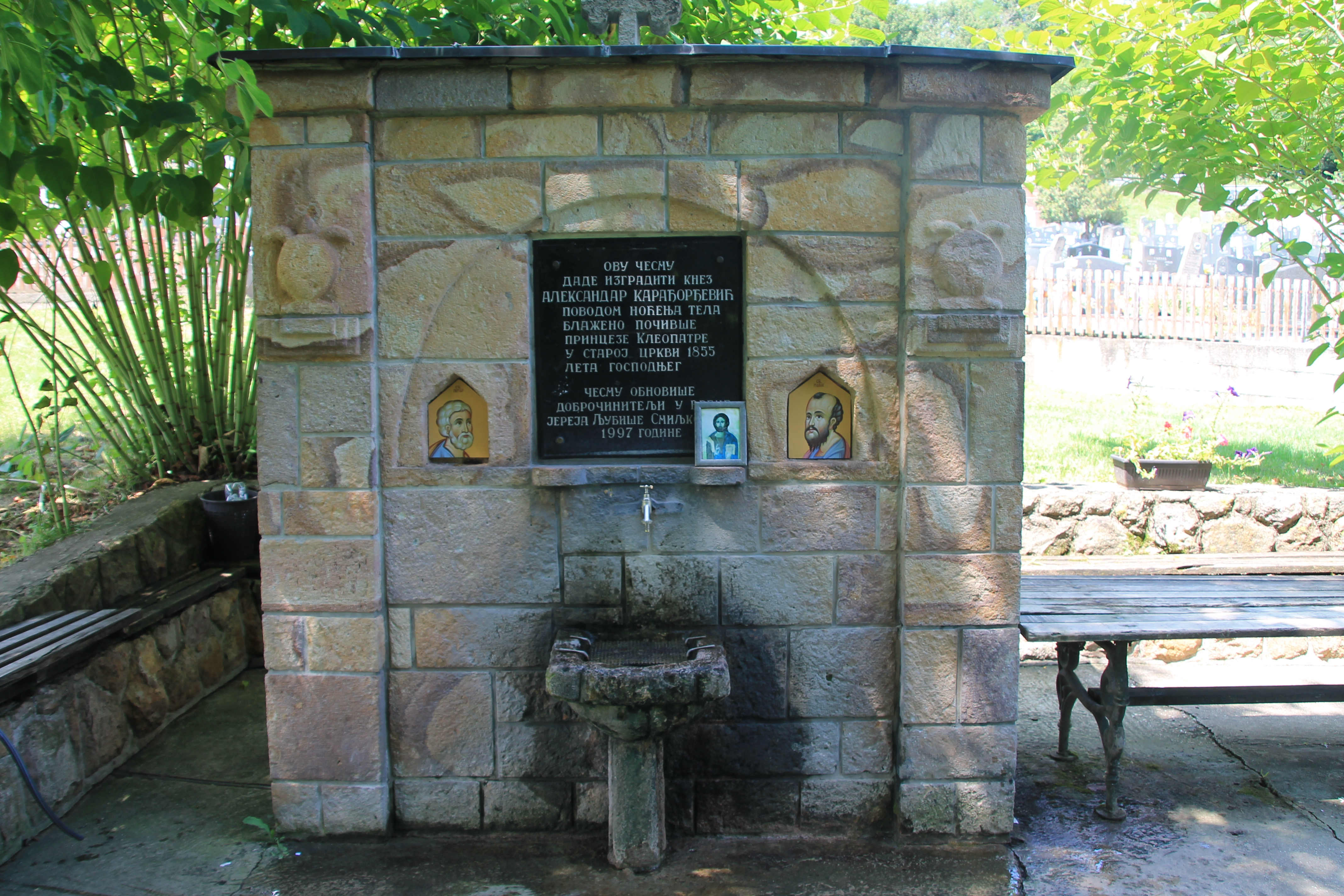 Crkva Sv. Petra i Pavla (Nemenikuće)